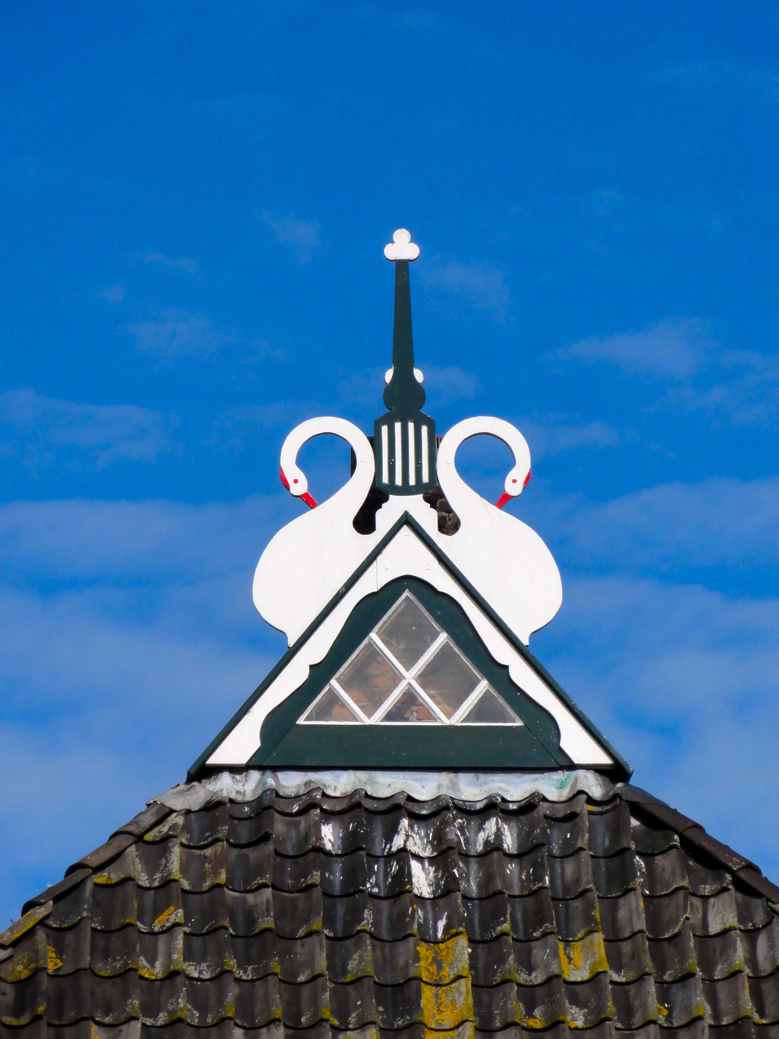 Uilenbord op een boerderij nabij Wijckel